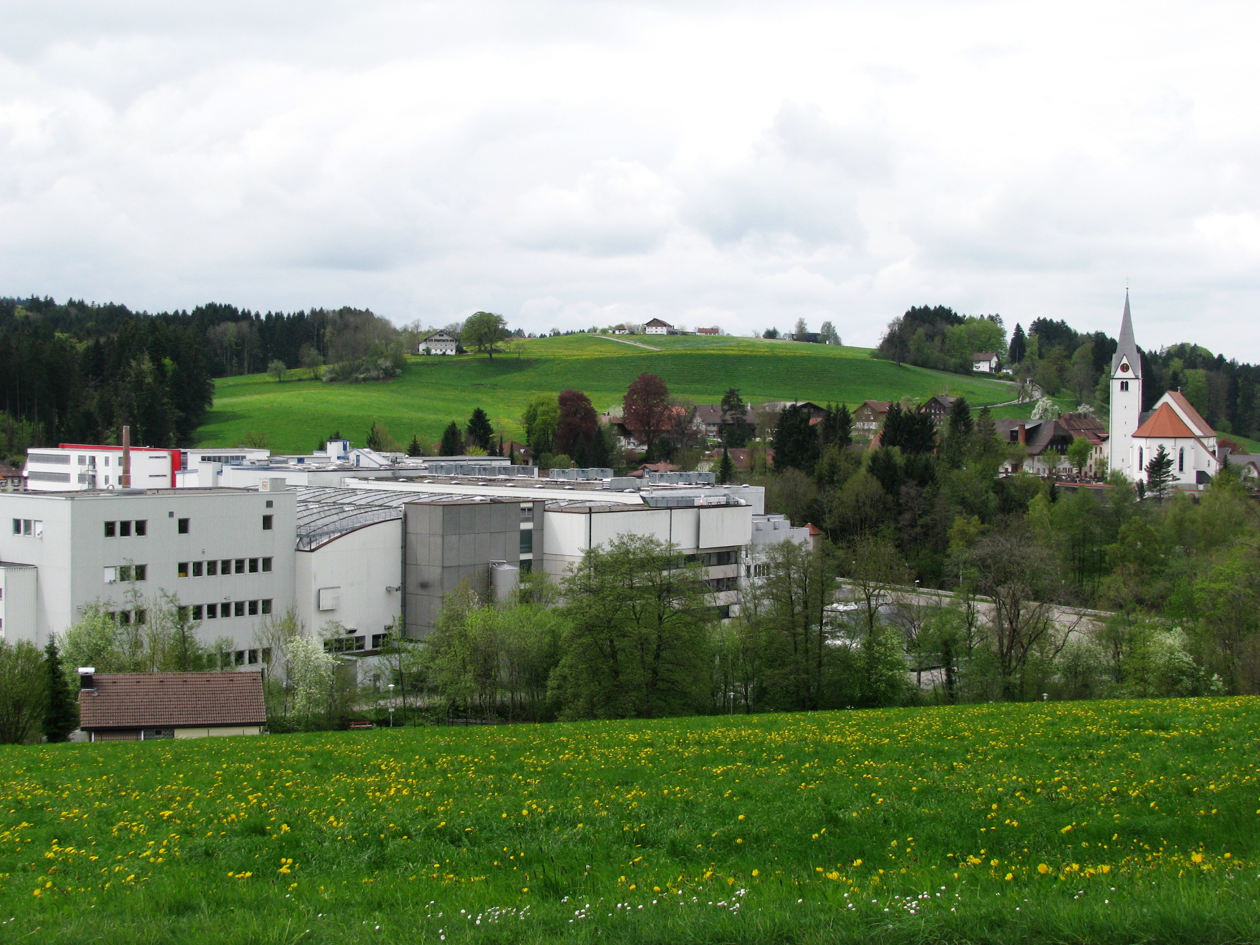 Heimenkirch im Allgäu mit Betriebsgebäuden des Käseproduzenten Hochland AG und der Pfarrkirche.